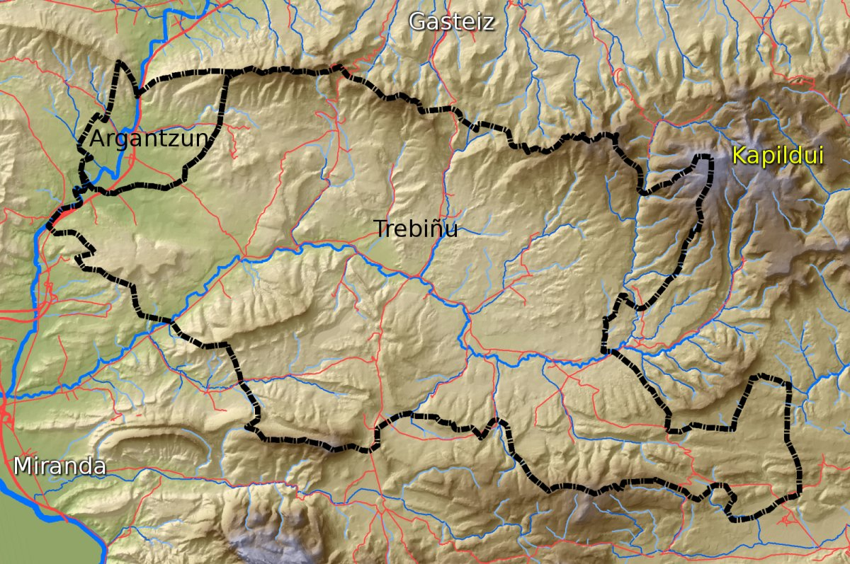 Trebiñuko konderriaren mapa / Mapa del condado de Treviño